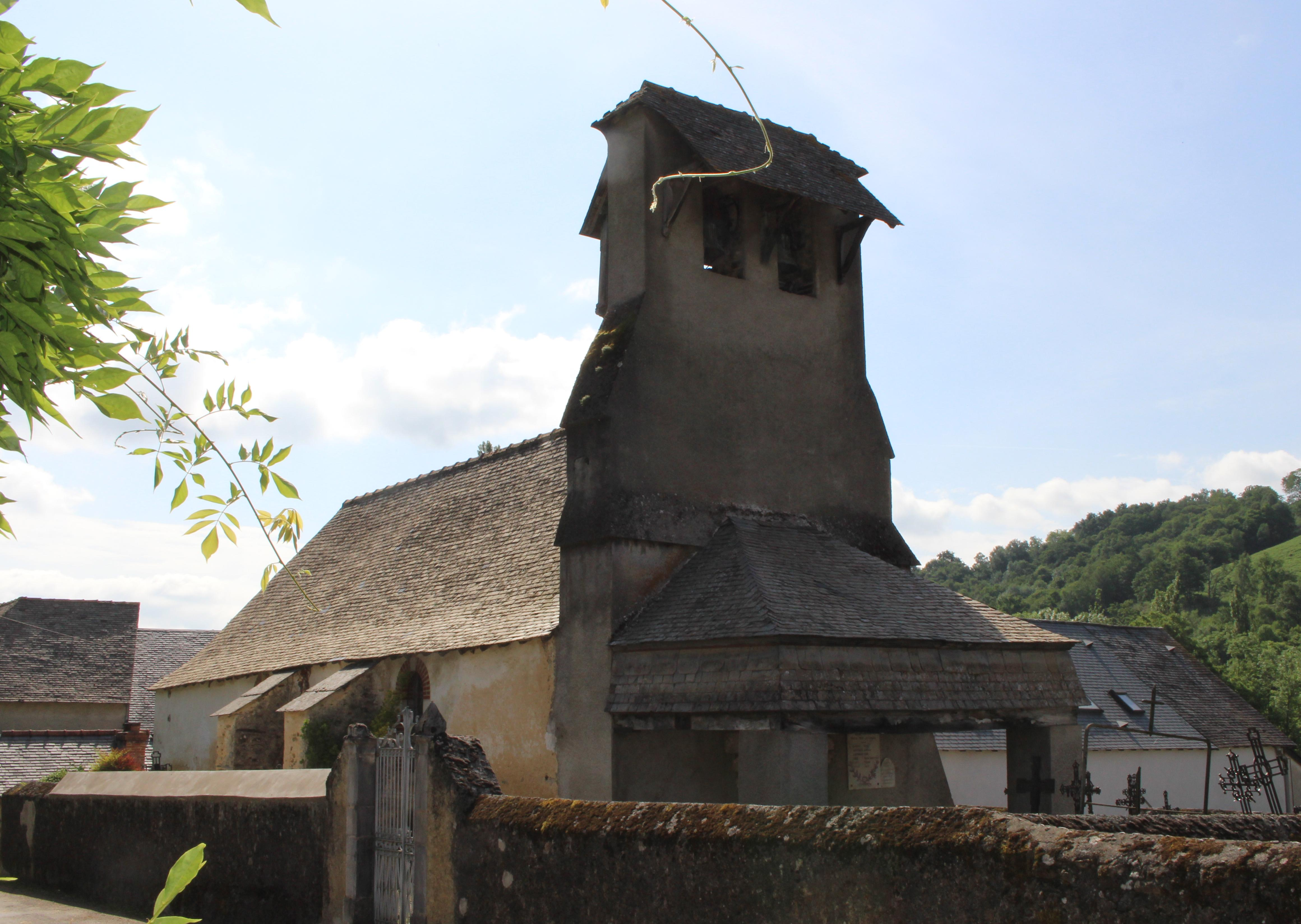 Église Notre-Dame-de-l'Assomption de Paréac (Hautes-Pyrénées)